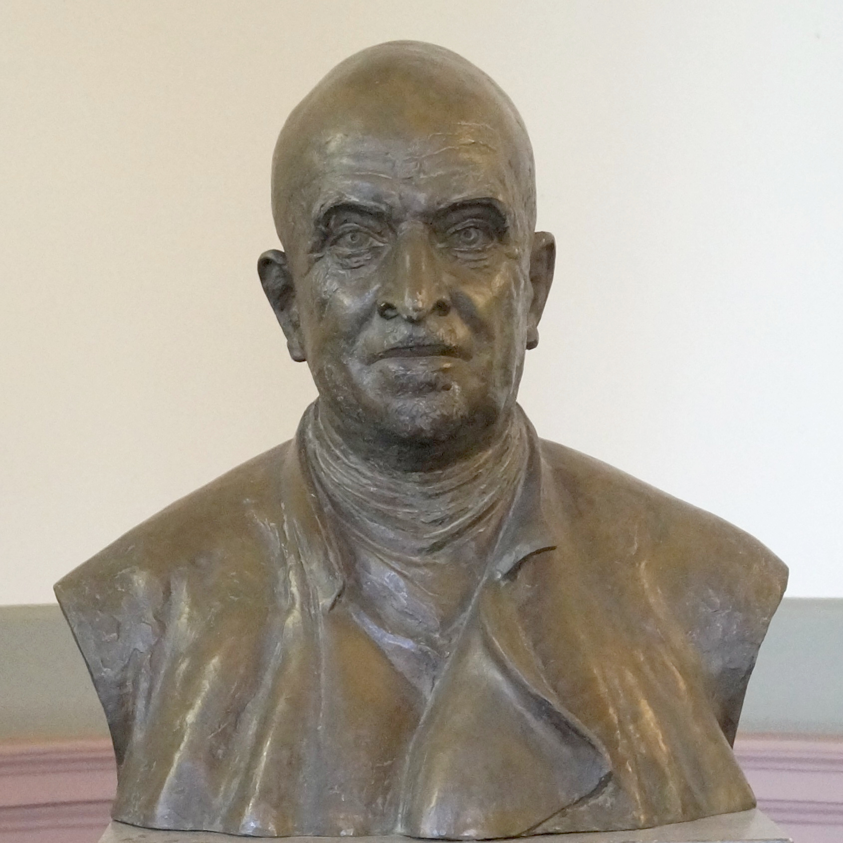 Büste von Johannes Sobotta in der Eingangshalle des Anatomischen Instituts der Universität Bonn